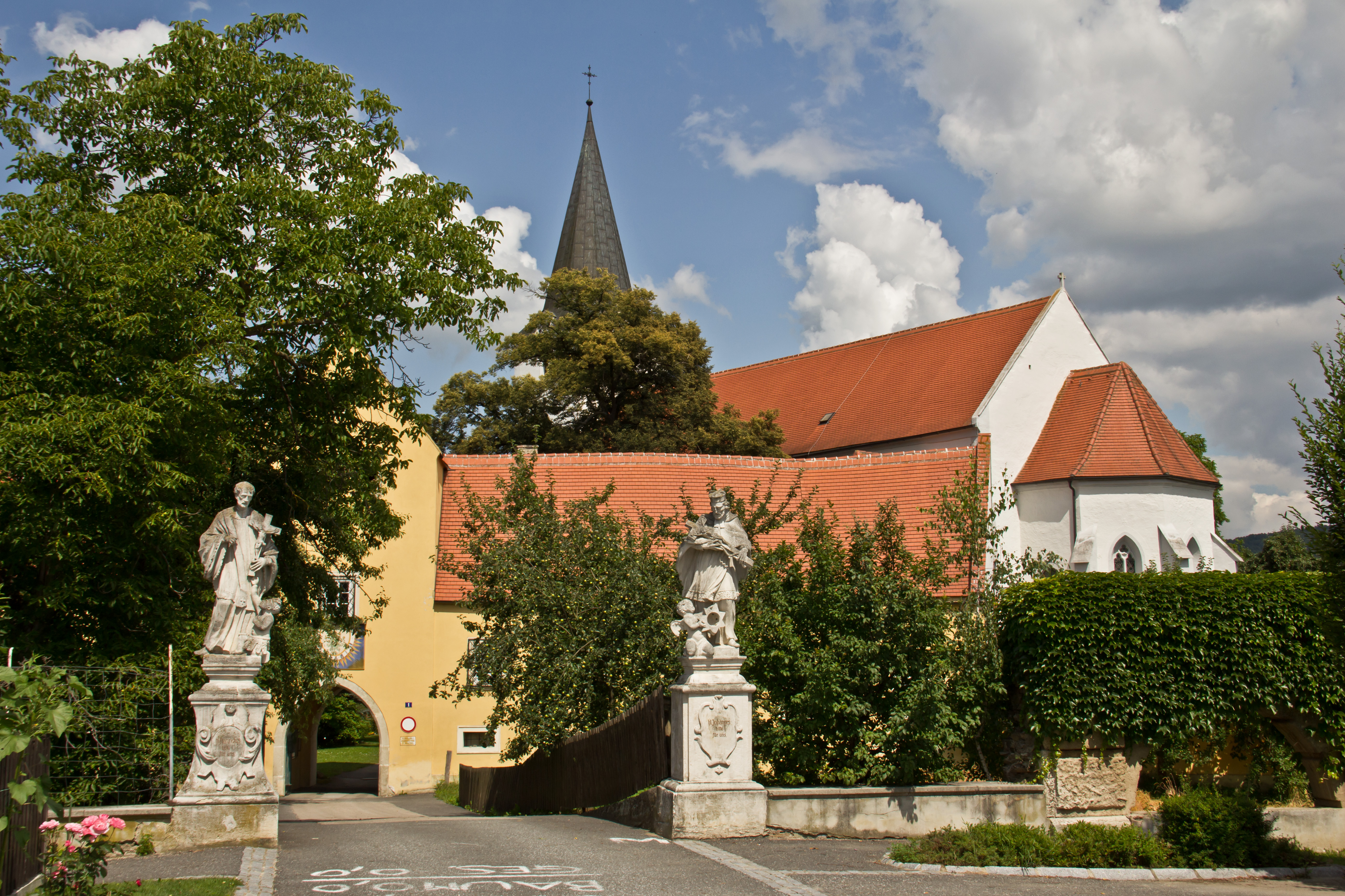 Das Stift Sankt Bernhard ist ein ehemaliges Zisterzienserinnenkloster gestiftet von Stephan von Maissau 1277. Teile wurden 1961 abgetragen und im Stift Klosterneuburg wieder aufgestellt.